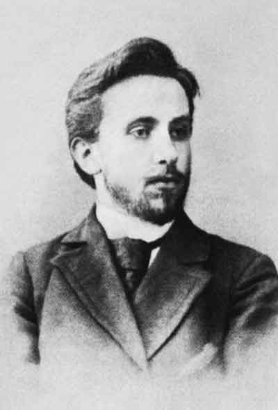 Александр Антонович Курсинский (1873-1919) - русский поэт-символист